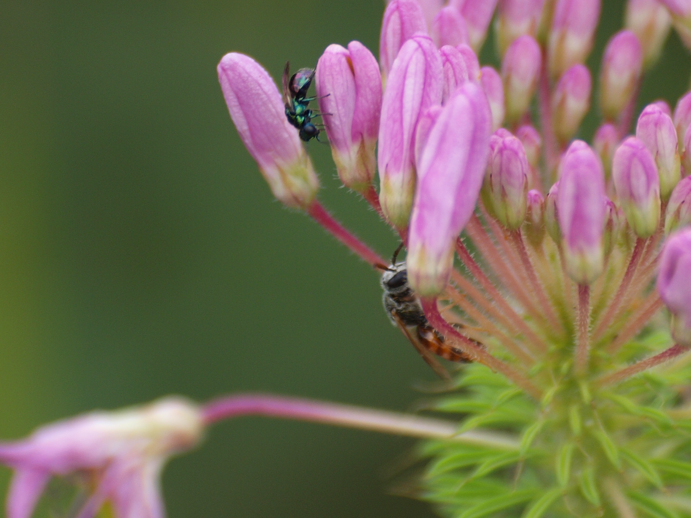 2012:08:29 14:40:23 (p8295801u)